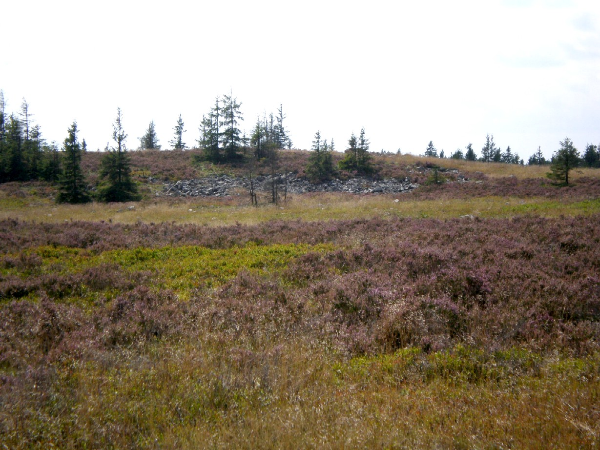 Kamenný polygon na Tocké pláni